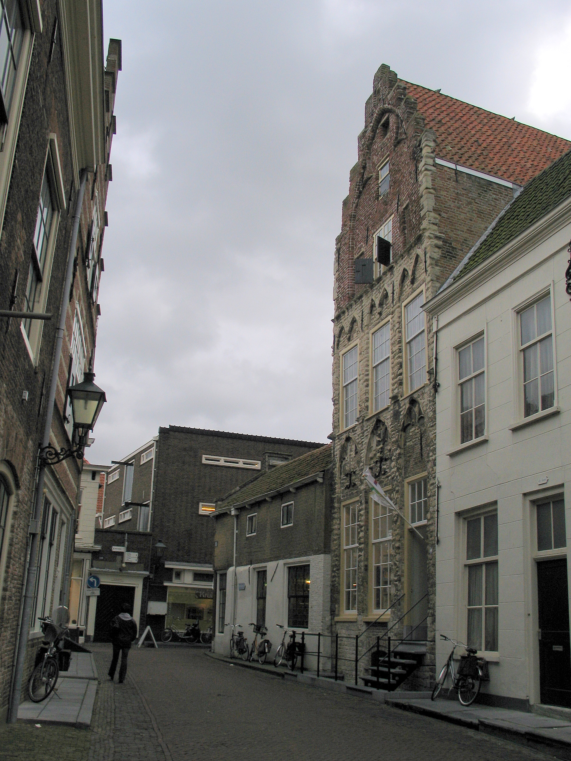 Huis De Haene te Zierikzee - eigen foto